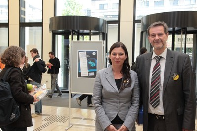 Sandra Scheeres mit Jan-Hendrik Olbertz bei der Langen Nacht der Wissenschaften am 2. Juni 2012